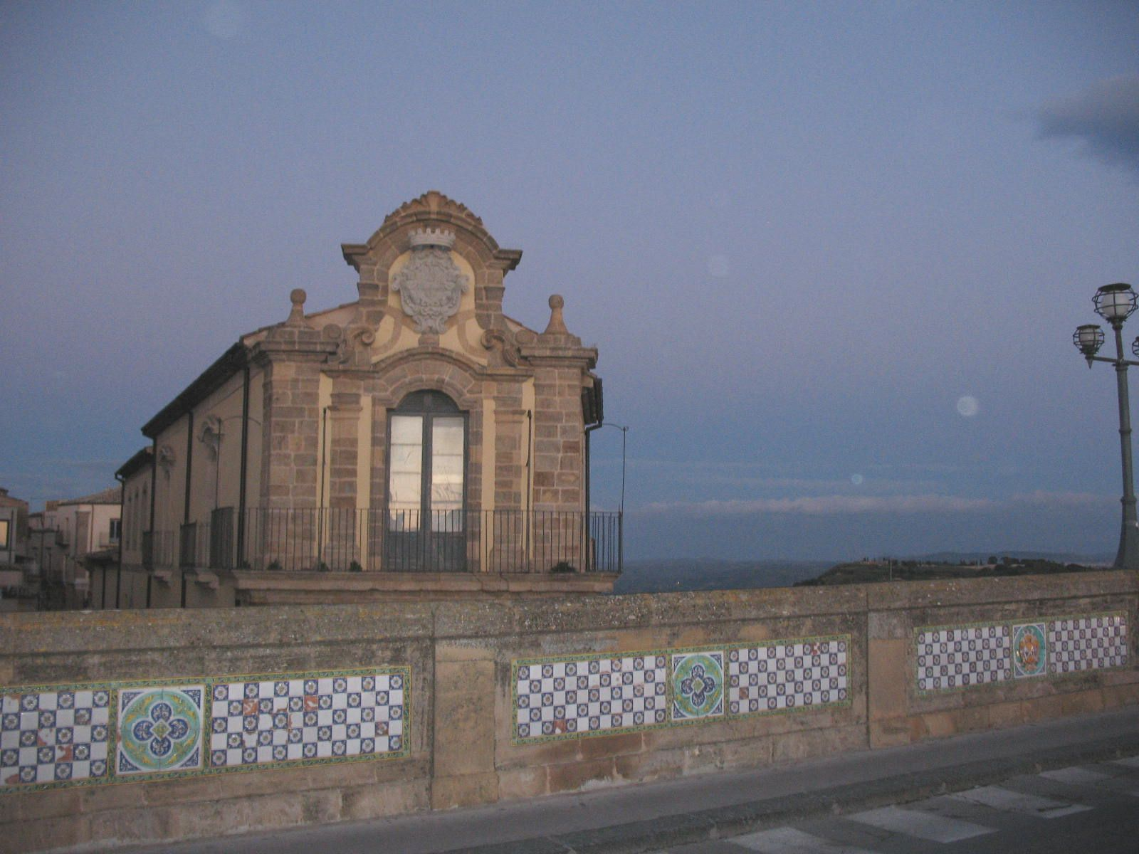 Palazzo nobiliare e Ponte San Francesco, Palazzo nobiliare e Ponte San Francesco